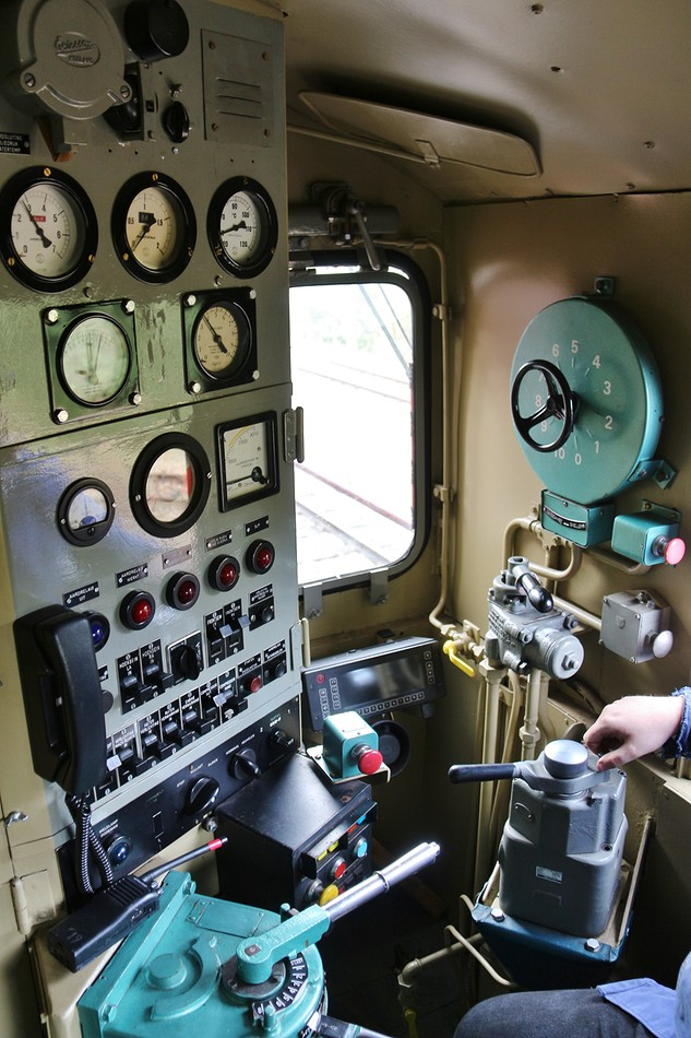 Interieur NS 2225 van de stichting Museum Materieel Railion